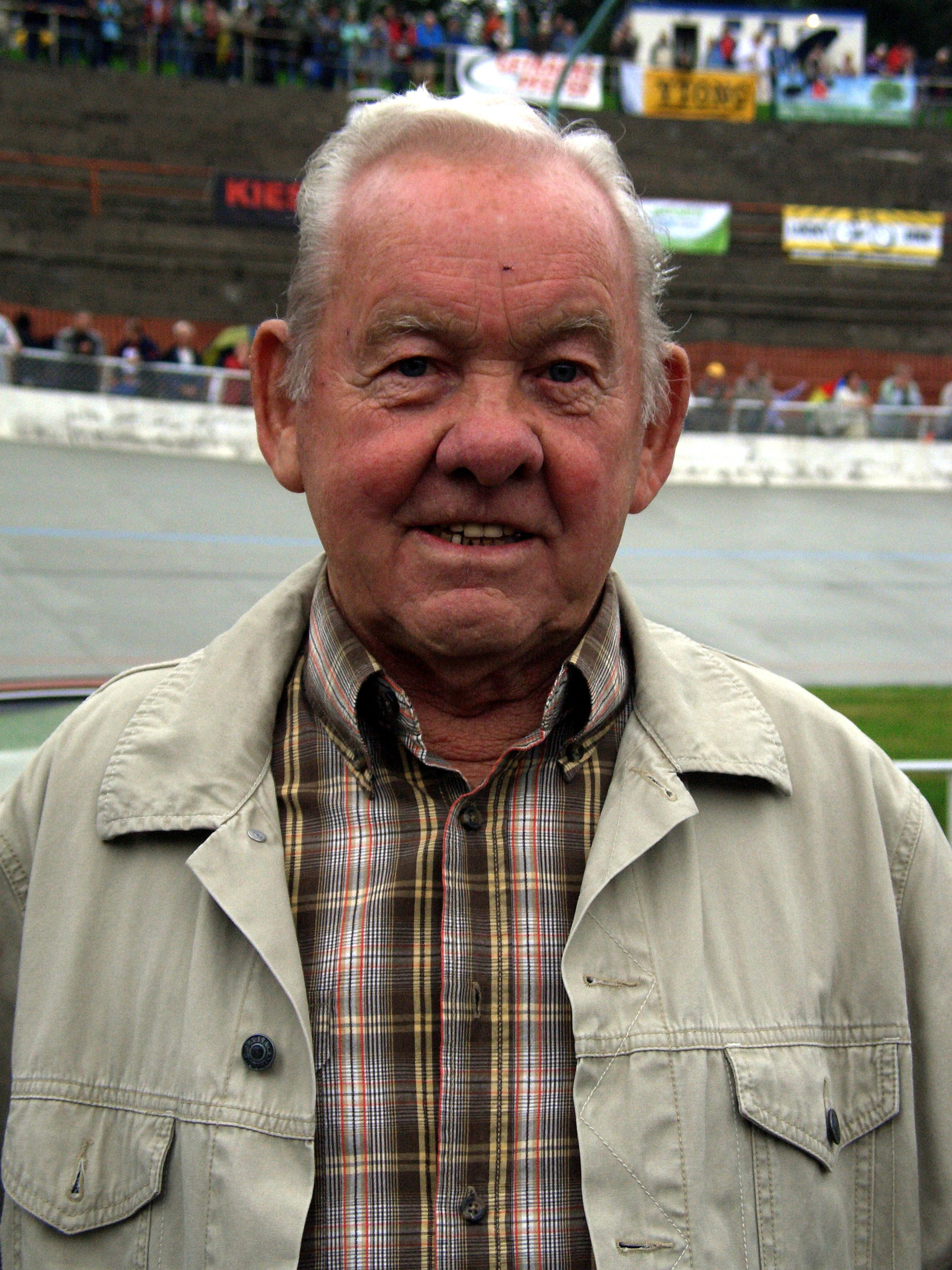 Lothar Meister I, ehem. Radrennfahrer, am 13. August 2010 in Chemnitz bei der Veranstaltung zum 50. Jahrestag der Steher-WM 1960